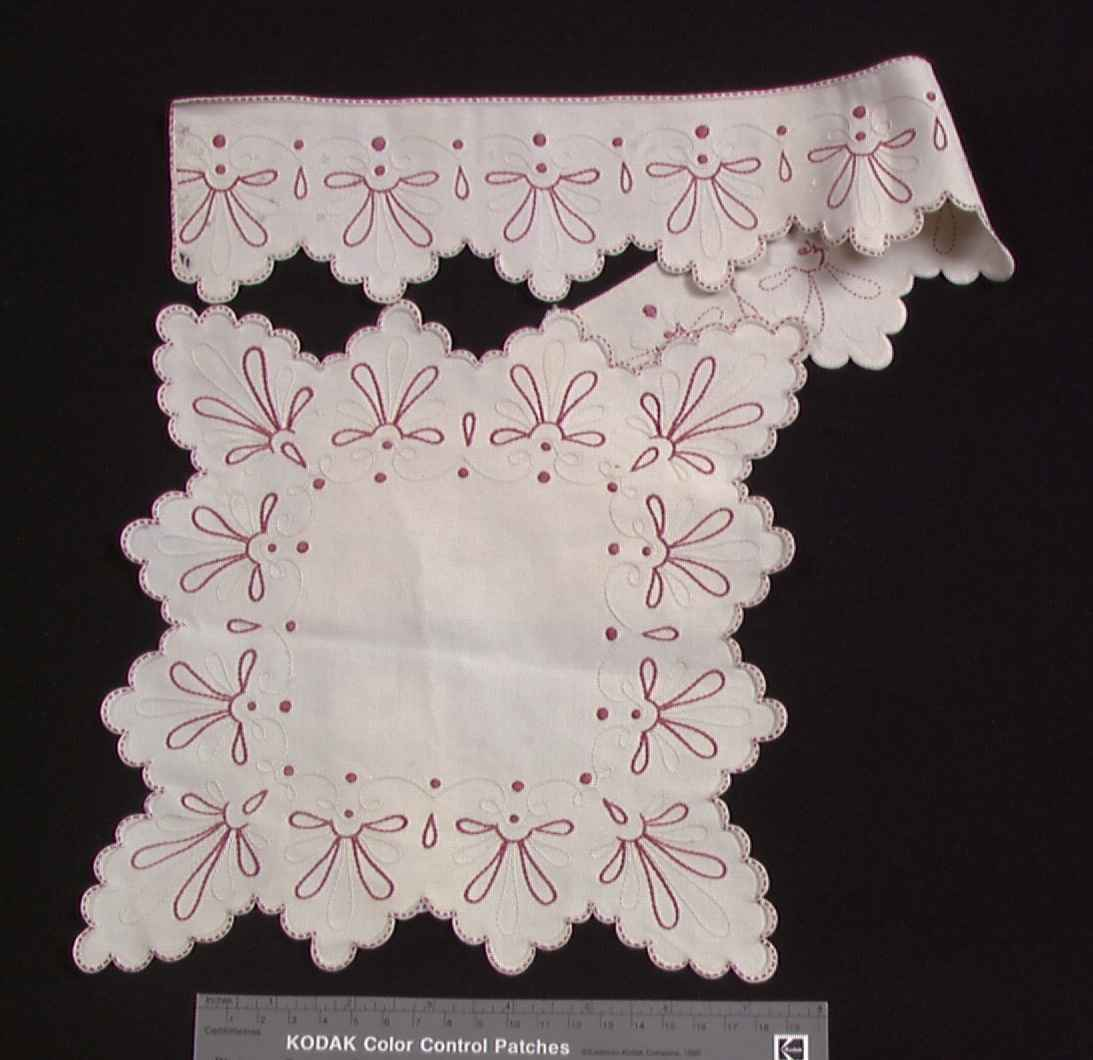 Brodert ostebrikke og ostebånd i bomull. Foto Anne-Lise Reinsfelt / Norsk Folkemuseum, NF.1938-0434AB.